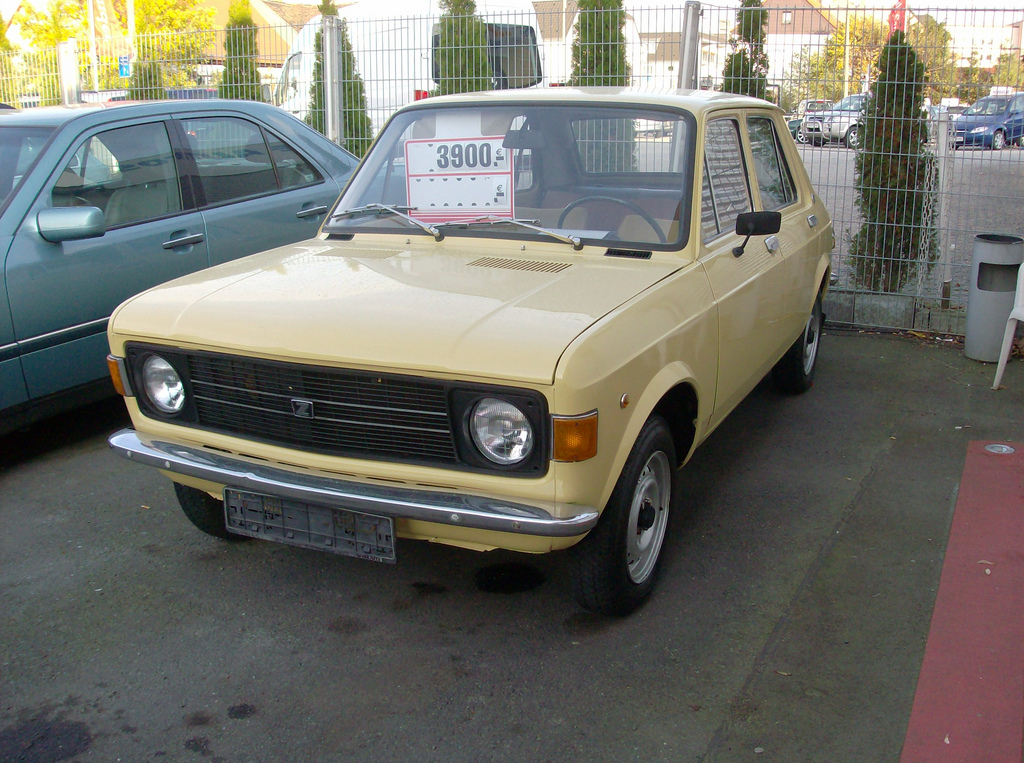 Zastava 101 in n Leipzig, Saxony, Germany.